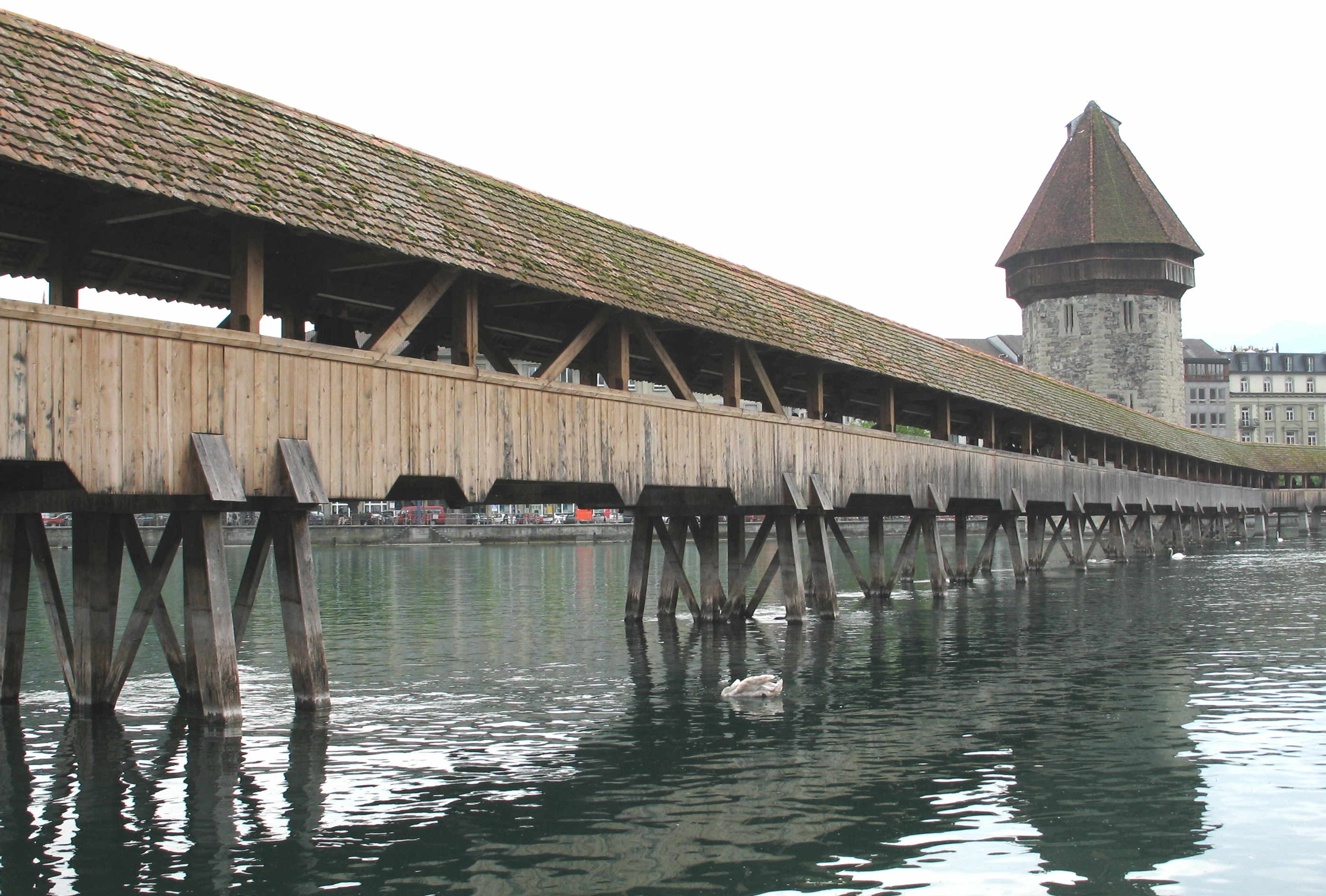 D'Kapellbrëck mat dem Waassertuerm zu Luzern.